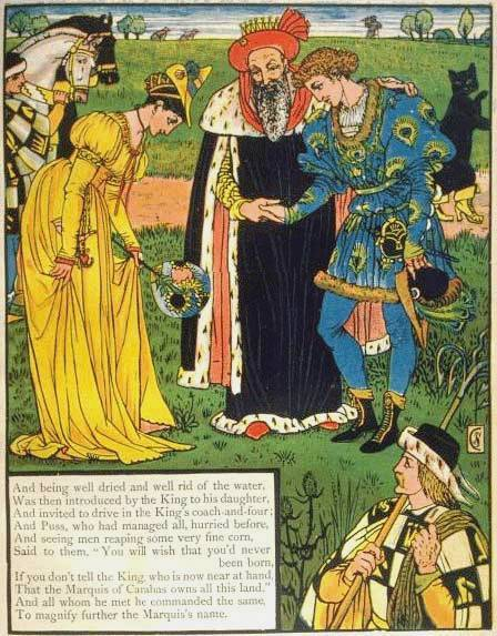 Гравюры по рисункам Крейна к сказке "Кот в Сапогах"